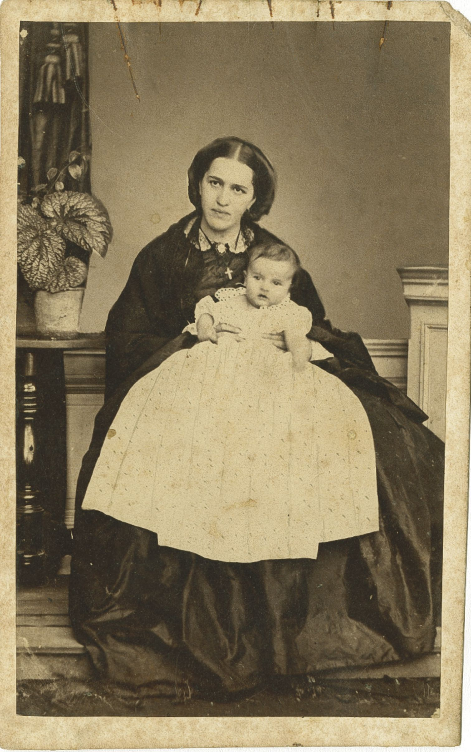 Pauline von Württemberg (1855-1914)